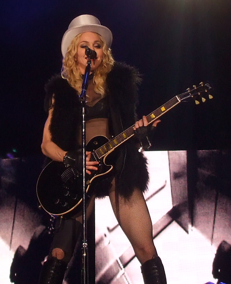 Моја фотографија са концерта у Будви, 25. септембар 2008. Аутор:Ненад Поповић